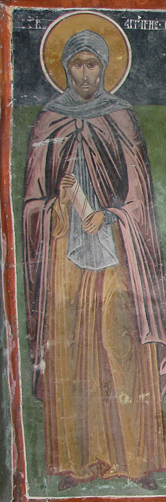 Ангеляр на изображении: Собор Болгарских Просветителей. Фрагмент фрески, XVII в. Нижний регистр. Северная Македония, с. Сливница, Сливнички монастырь, церковь Рождества Пресвятой Богородицы (северная стена, неф)